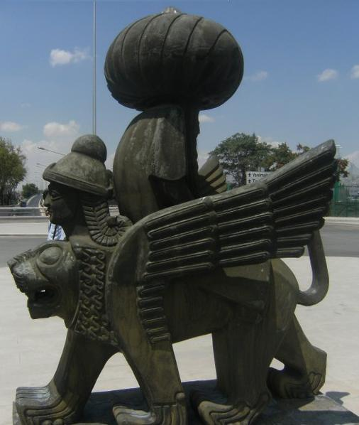 Nasrettin Hoca'nın eşek değil de Hitit aslanı üzerine ters binmiş şekilde tasviri Metin Yurdanur tarafından yapılmıştır. Heykel Ankara Tren Garı önünde yer alır.